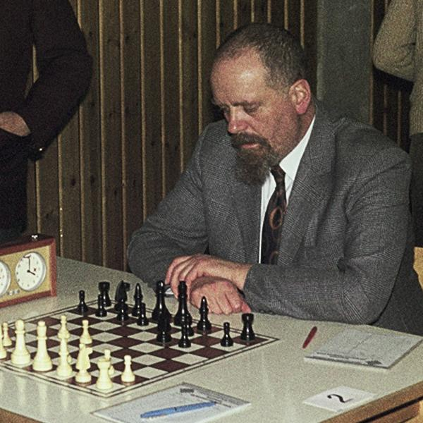 Heinz Lehmann 1973 als Teilnehmer am Silvesterturnier in Berlin, an dem auch Juliane Hund und ihre Familie teilnahm